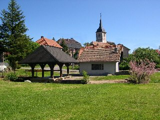 Village de Pérouse (Territoire de Belfort) Photo prise par LP90 Copyright : licence GFDL LP90